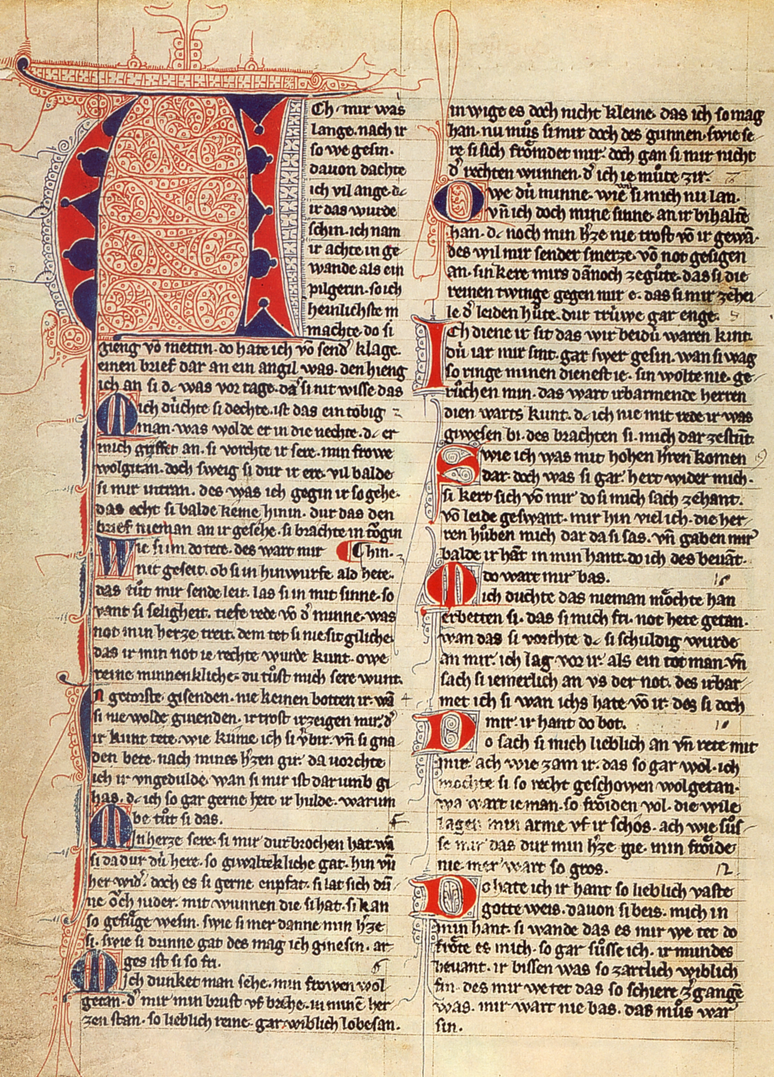 Codex Manesse, UB heidelberg, Cod. Pal. germ. 848, fol. 371v, Text der Dichtungen von Johannes Hadlaub